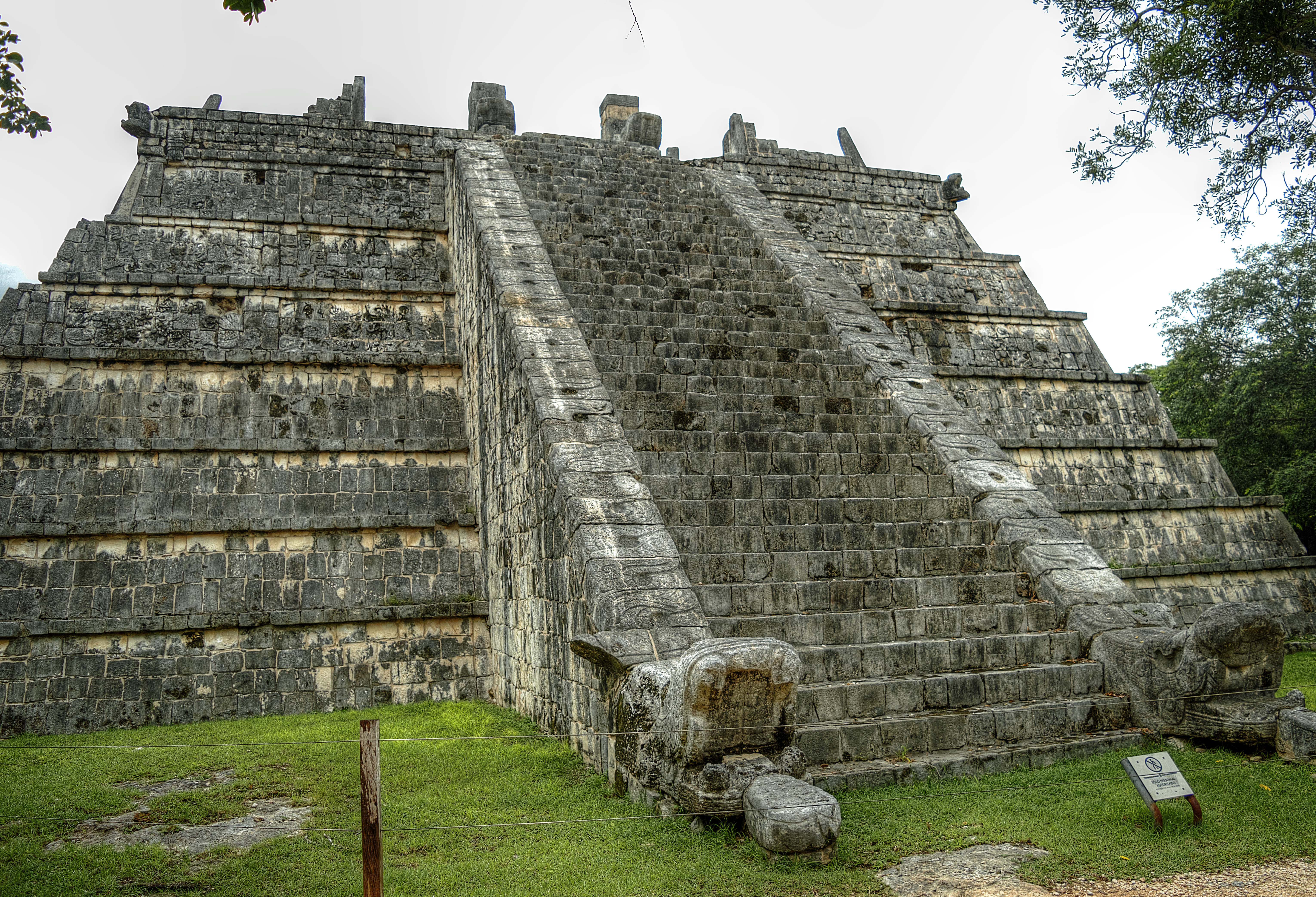 El "Osario" conocido también como "Tumba del Sumo o Gran Sacerdote" es muy similar al "Castillo" pero de dimensiones mucho menores. Chichén Itzá, Yucatán, México